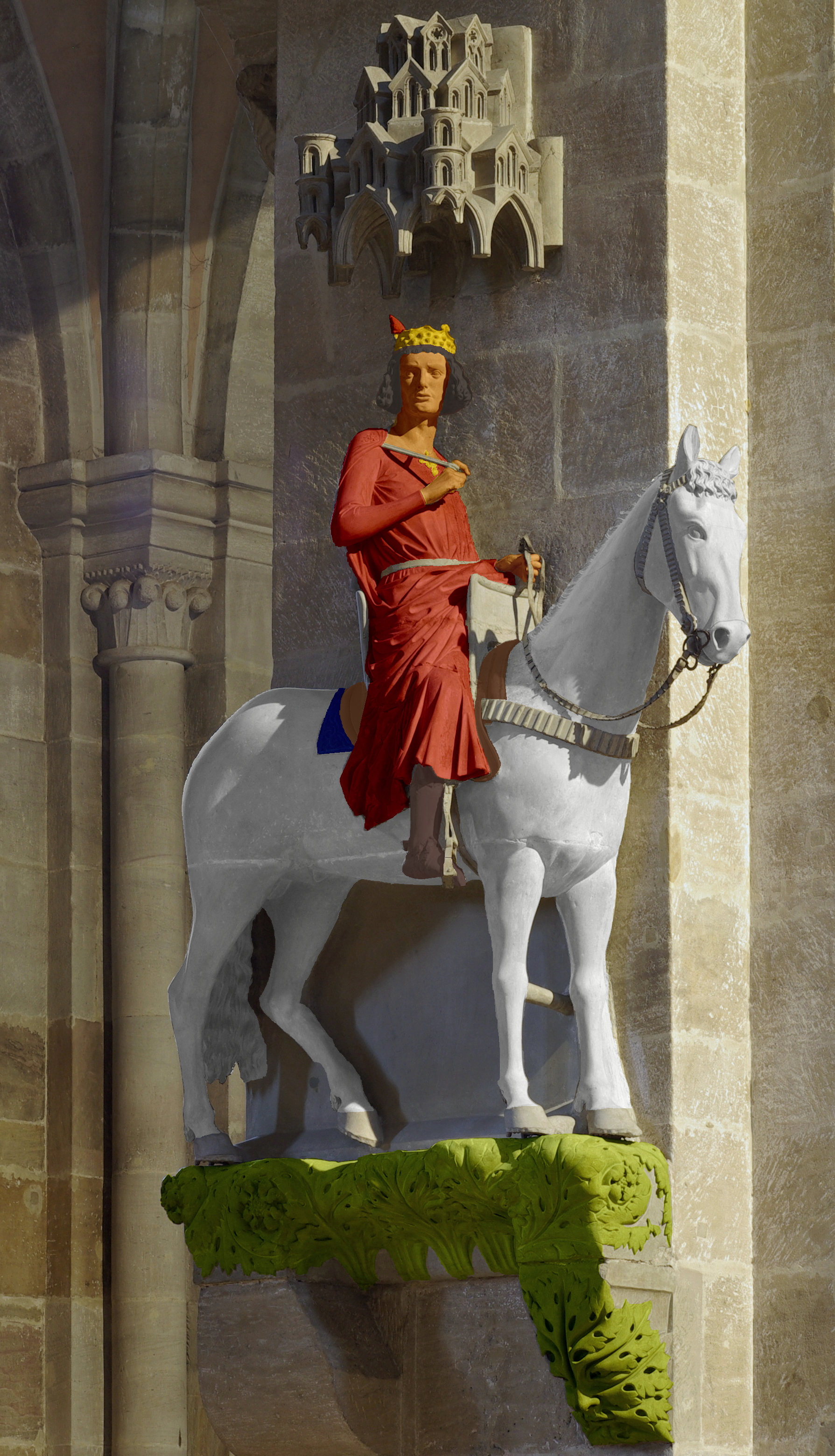 Rekonstruktionsskizze Bamberger Reiter